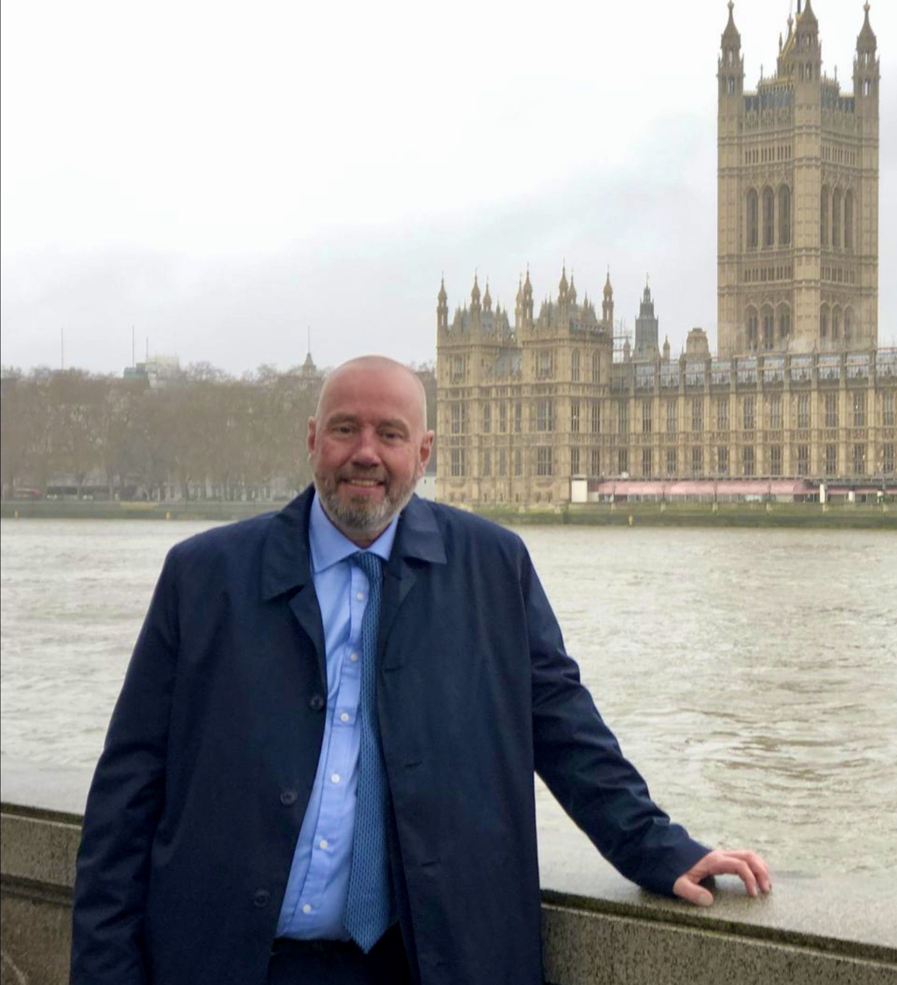 Jan Erik Mustad foran den britiske parlamentsbygningen